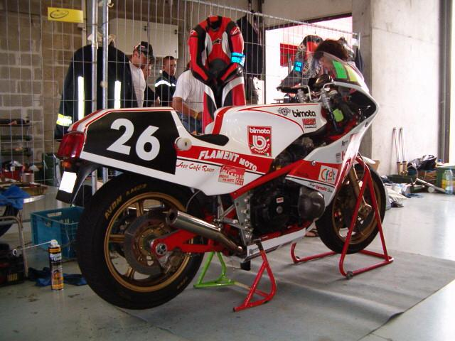 Bimota HB2- bol d'or classic 2003